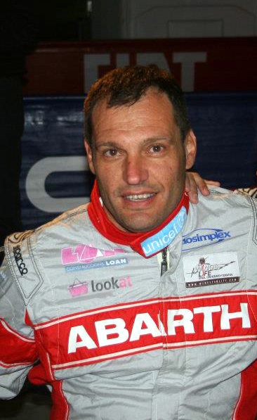 Albert Llovera en Rally Catalunya-Costa Daurada